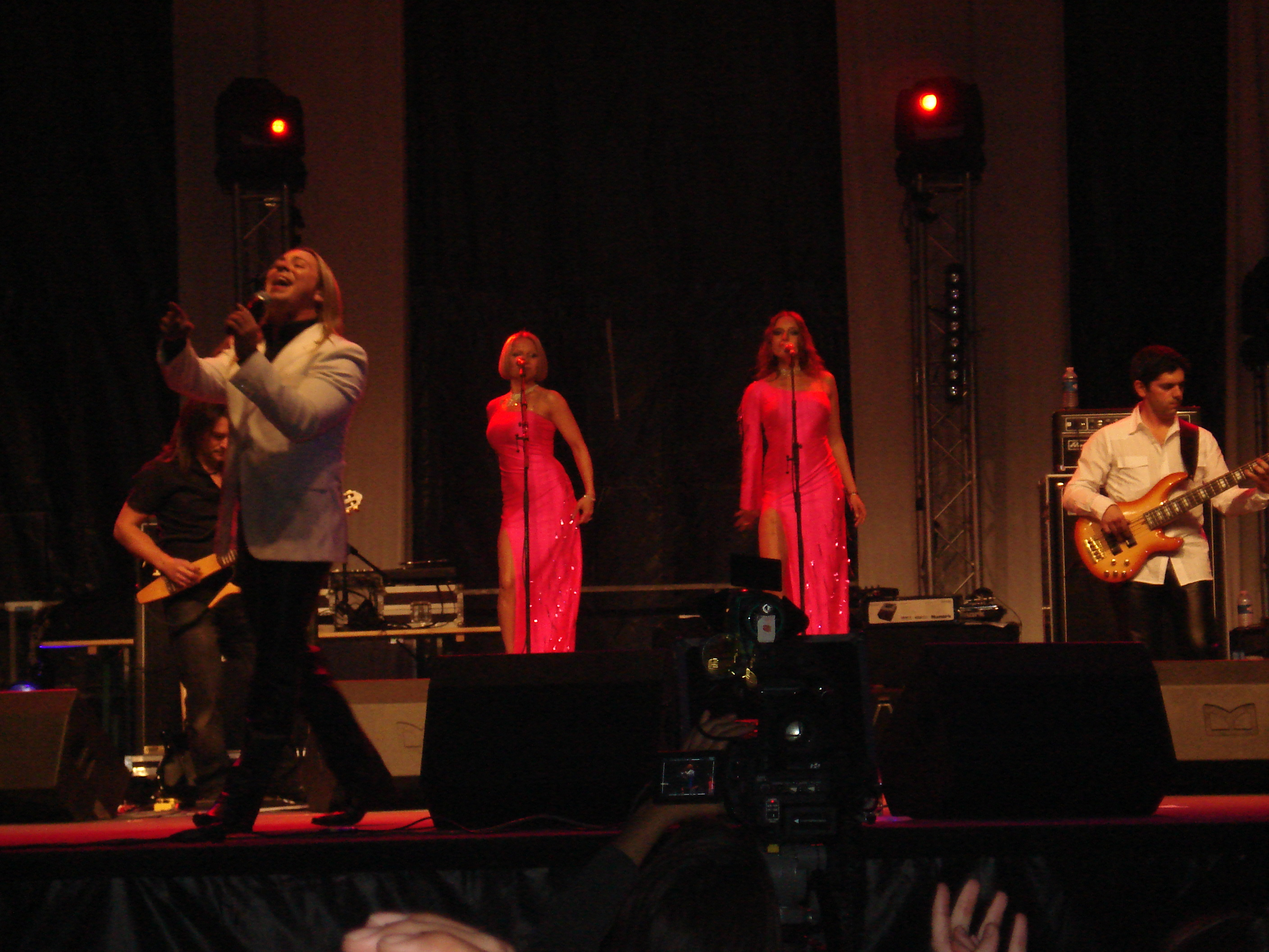 Rui Bandeira chante à Pontault-Combault